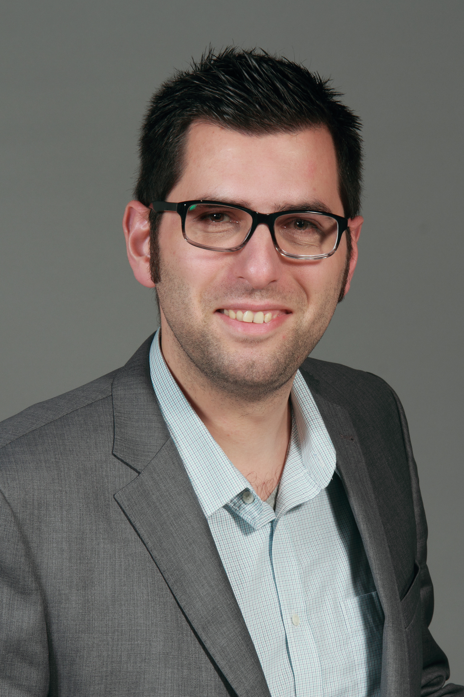 LandtagsabgeordneteR NRW